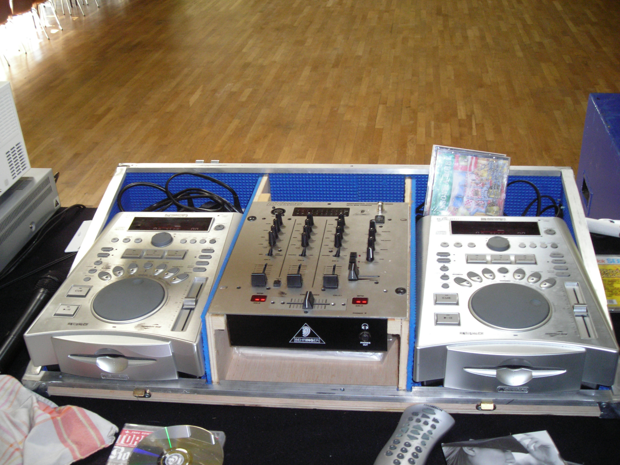 DJ Alain